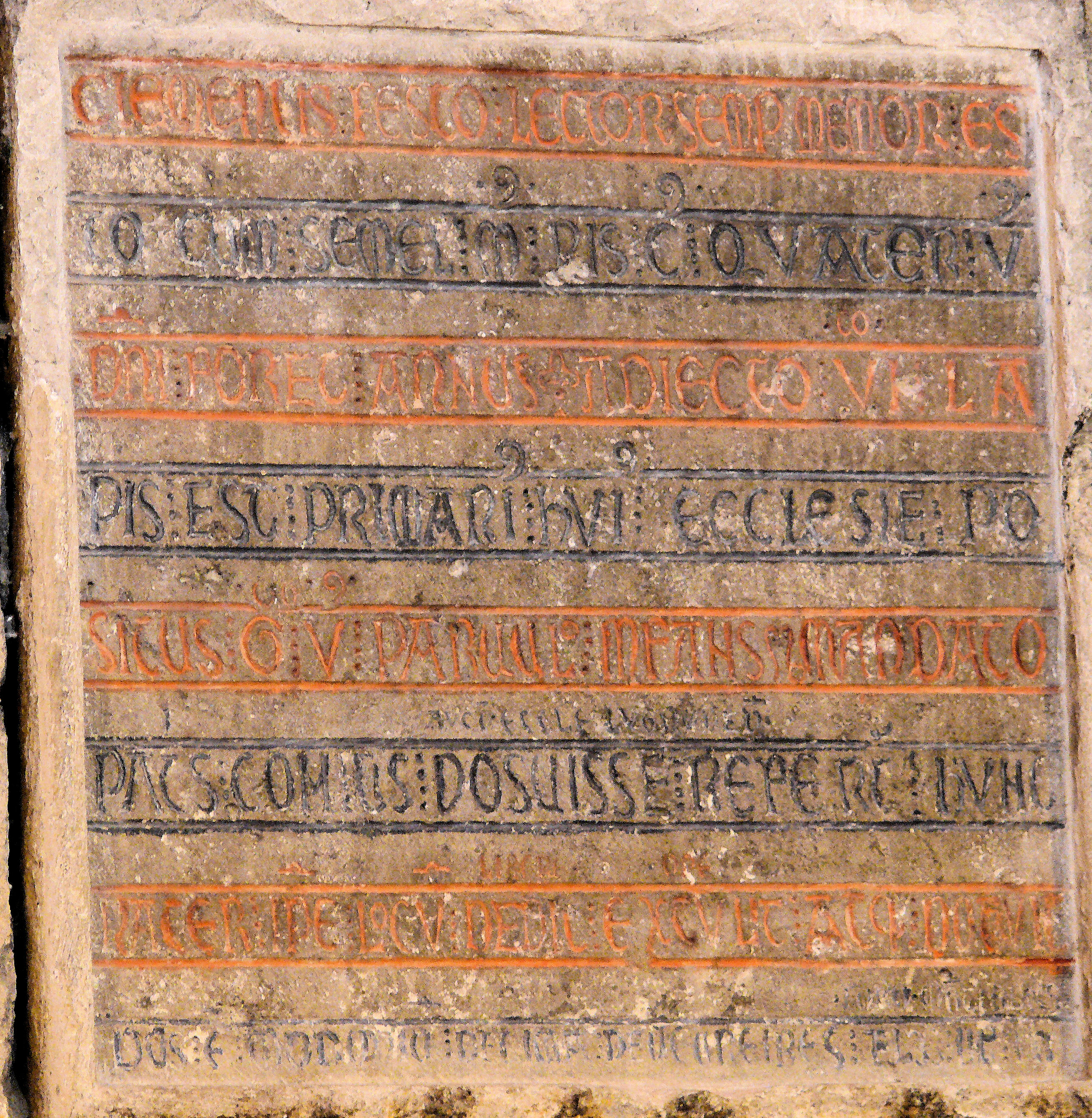 Montbrison - Collégiale Notre-Dame d'Espérance - Pierre d'honneur de 1226